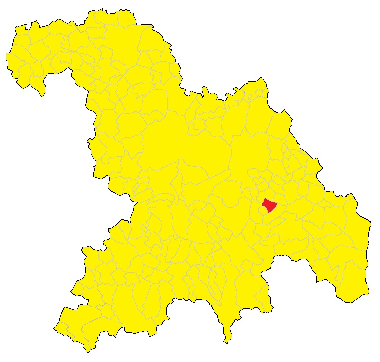 Mappa del comune di Sant'Agata Fossilli (AL)